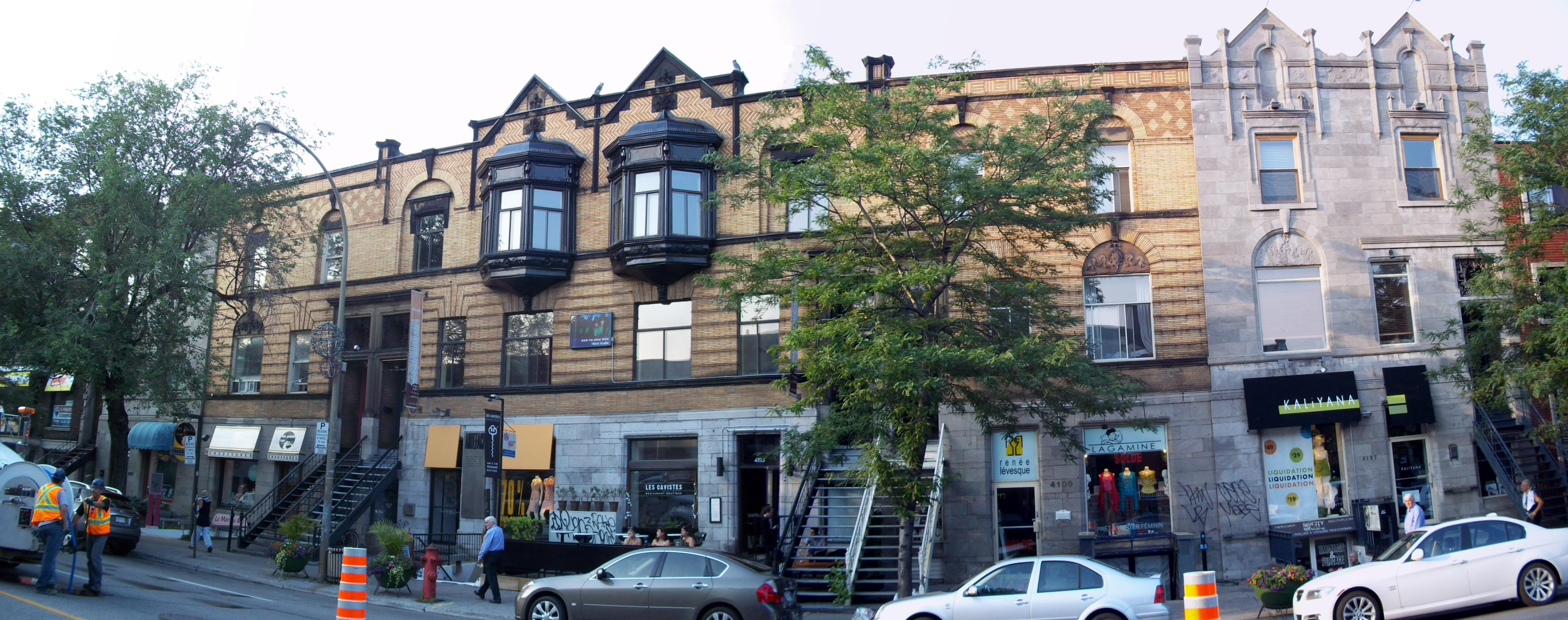 Maisons Emmanuel-Saint-Louis, 4105-4127 rue Saint-Denis, Montréal